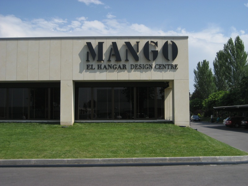 El Hangar de Mango, a Palau Solità i Plegamans, Vallès Oriental, Catalunya.